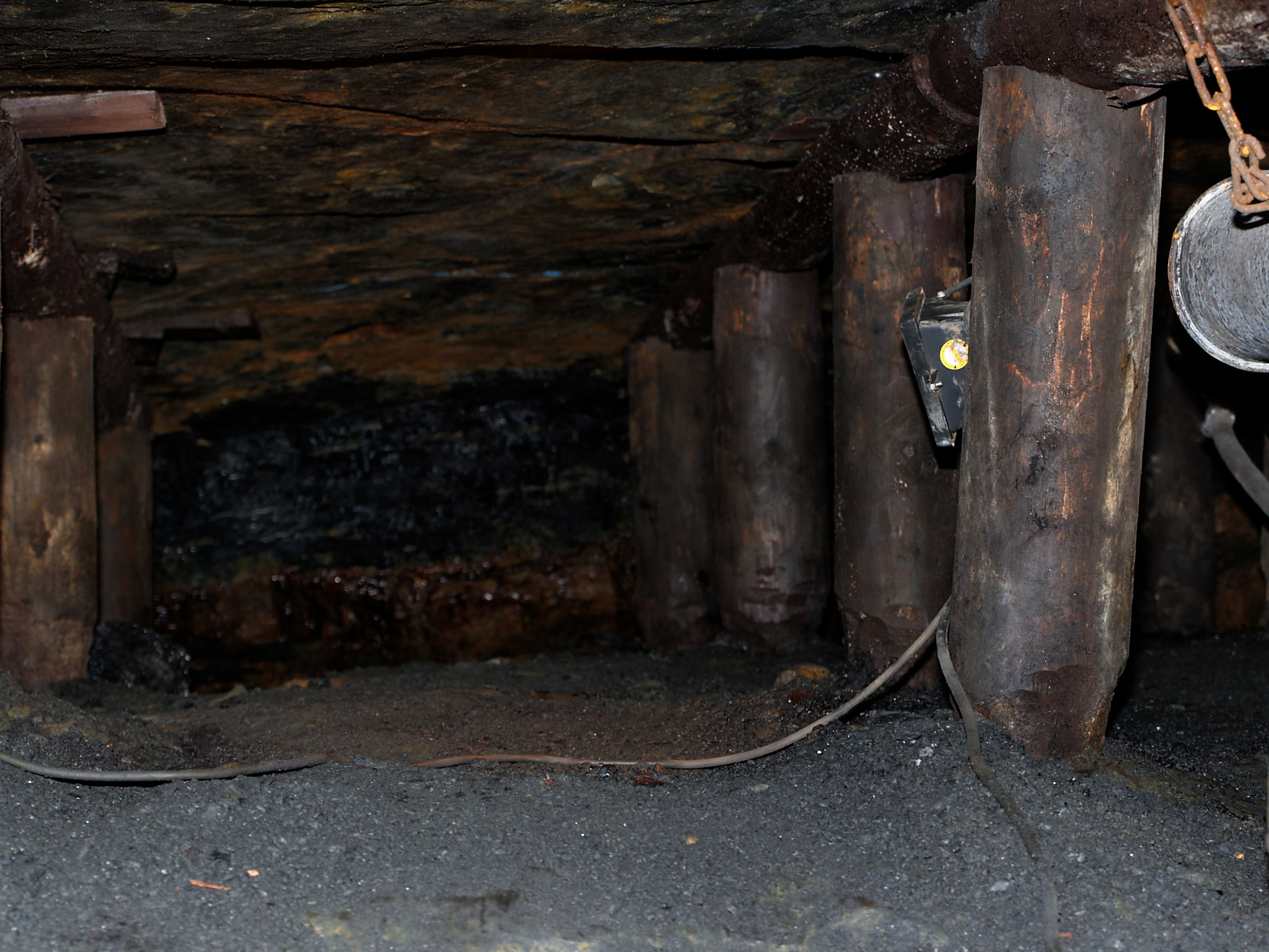 Hölzerne Grubenstempel in einem Streb der Zeche Nachtigall in Witten